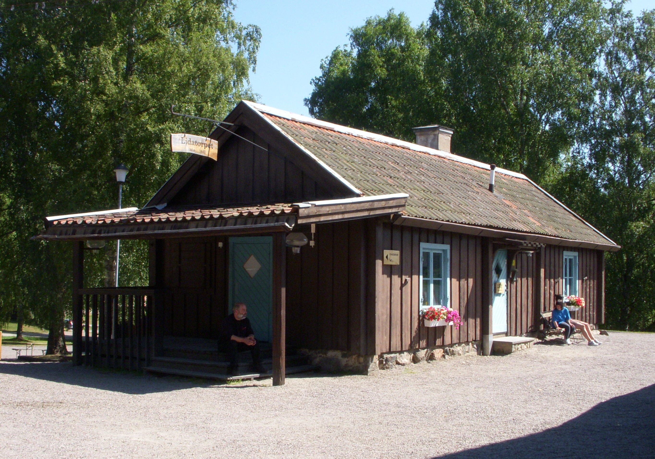 Lida friluftsgård Botkyrka kommun, ursprungsstugan "Lidatorpet"